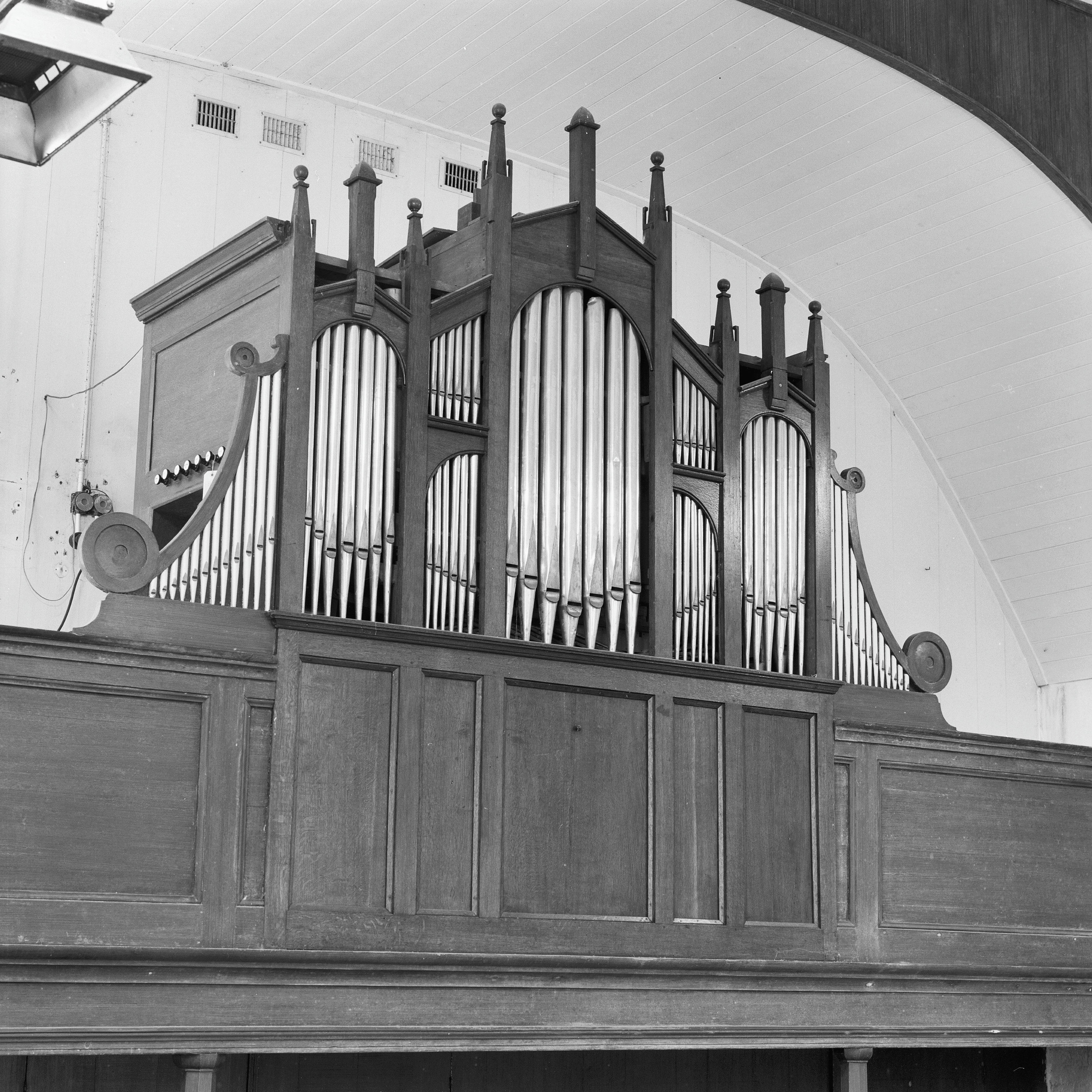 Nederlands Hervormde Kerk: orgelfront in schuine projectie